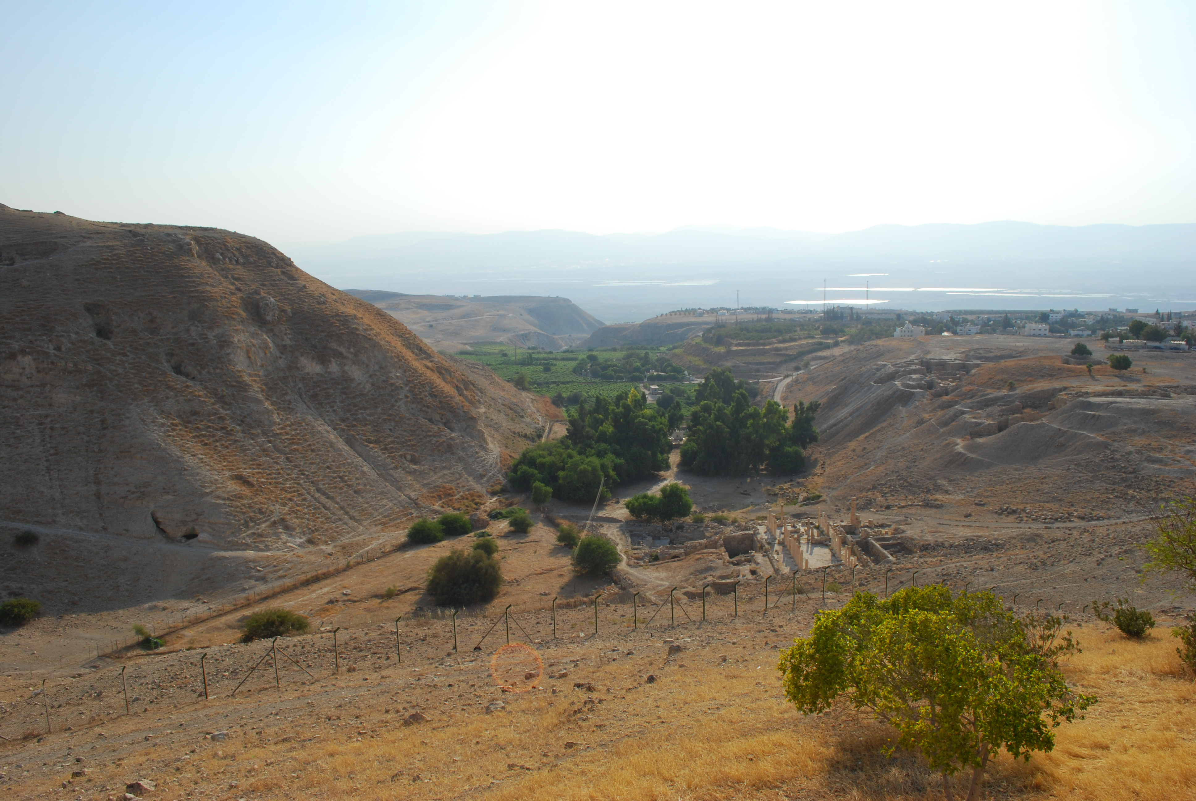 Pella (Tabaqat Fahil) : vue d'ensemble du site.